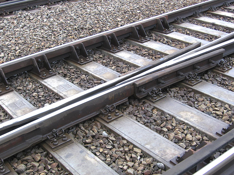 casted frog - Zábřeh na Moravě